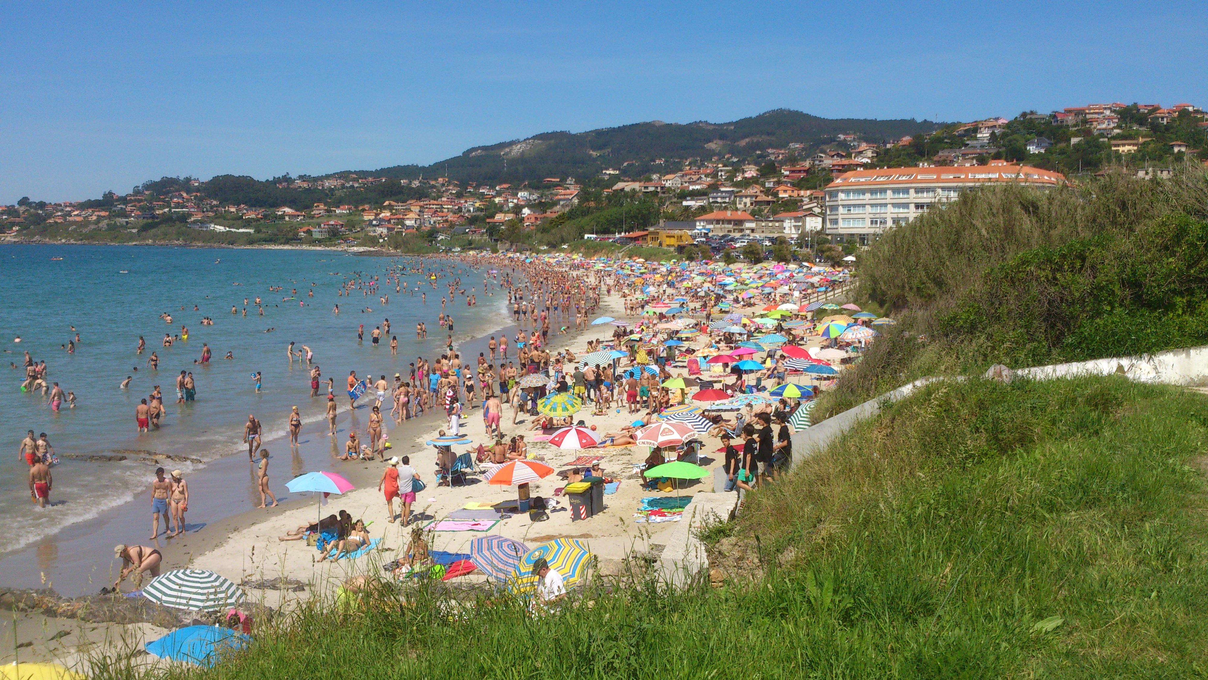 Playa de Patos, en el municipio de Nigrán (Galicia).